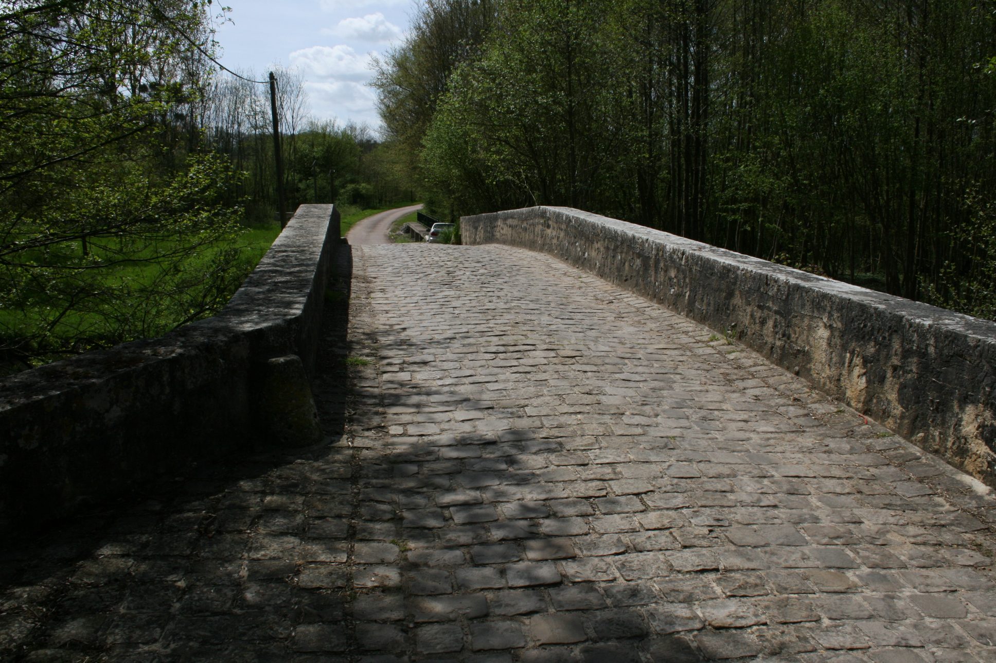 Pont du Gril de Corbelin – Commune de Griselles – Département du Loiret – France – Pont d lka fin du XII- début du XIIIème siècle